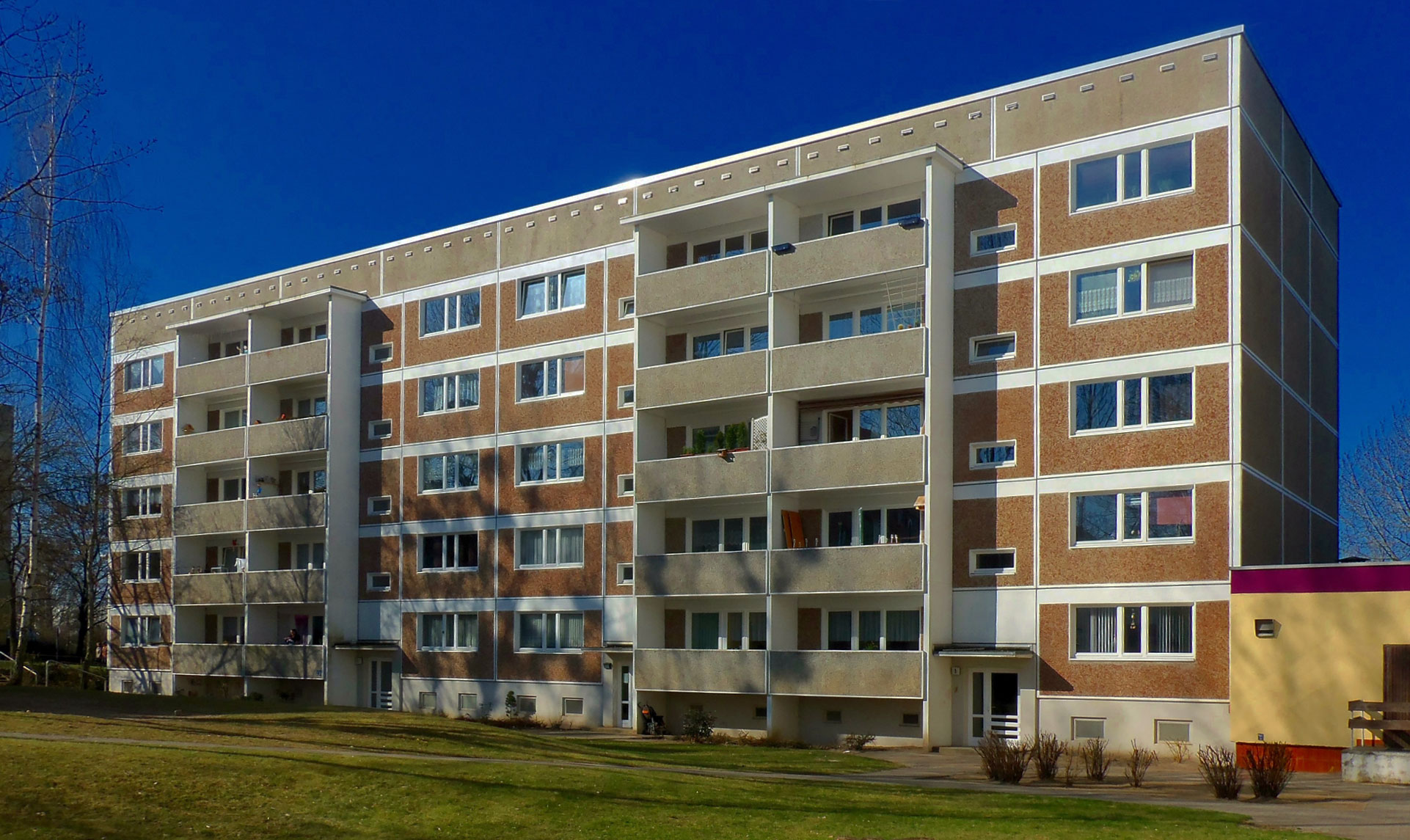 1. WBS 70 Block der DDR in Neubrandenburg, Koszaliner Straße 1/3/5/7; Rückseite, errichtet 1973